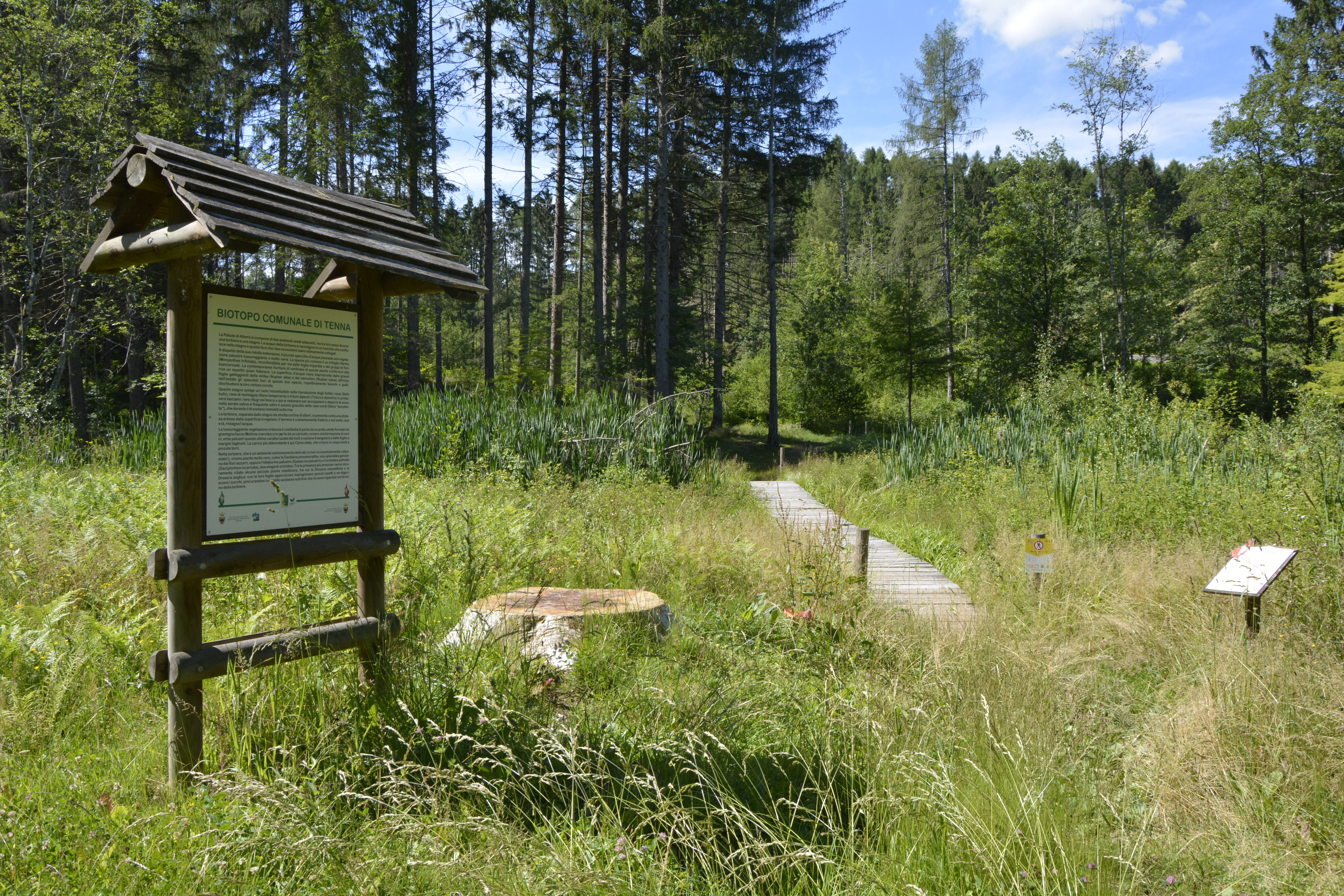 Alberè di Tenna (Q49967131)